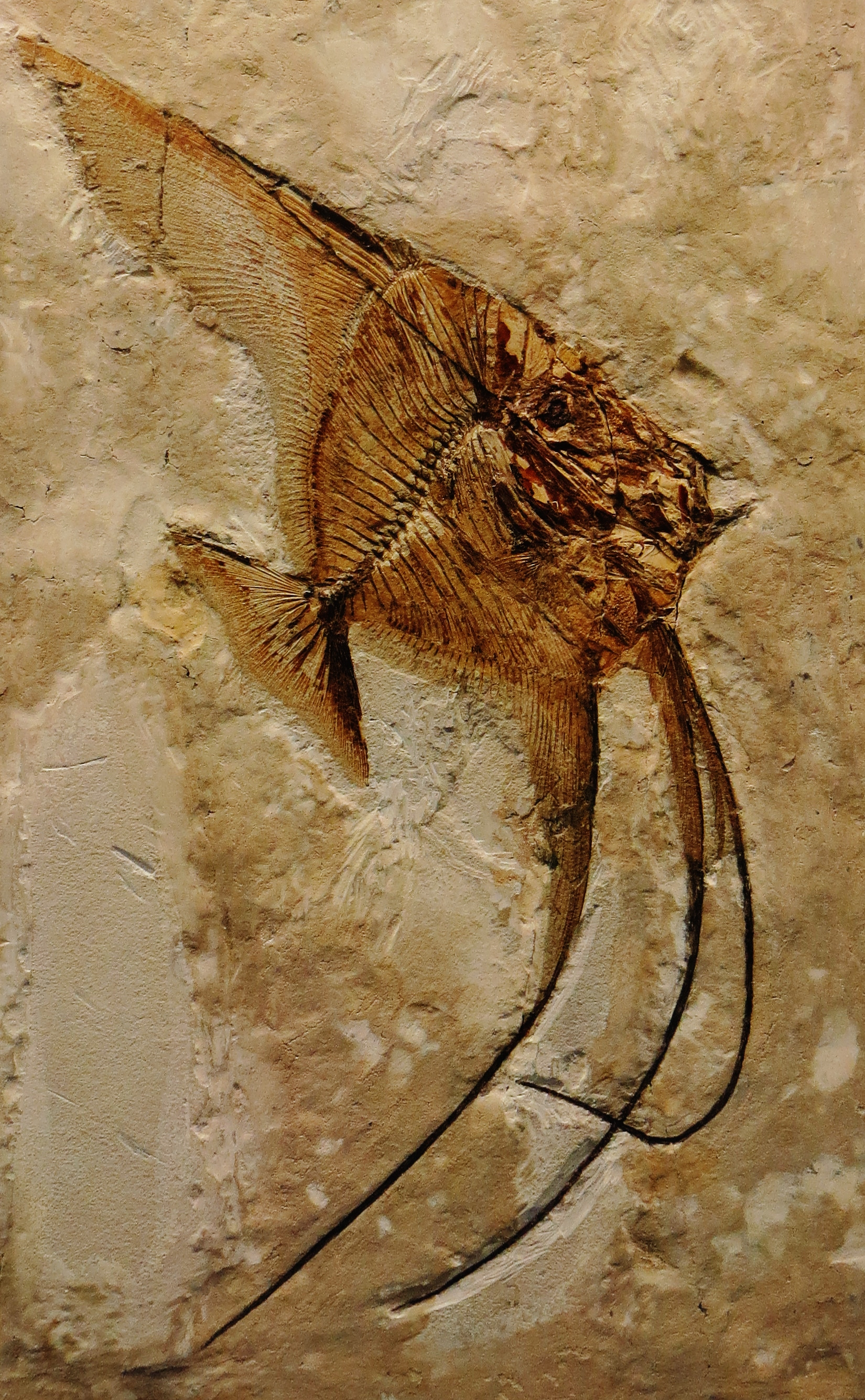 Fossil - Took the picture at Museo di storia naturale di Verona